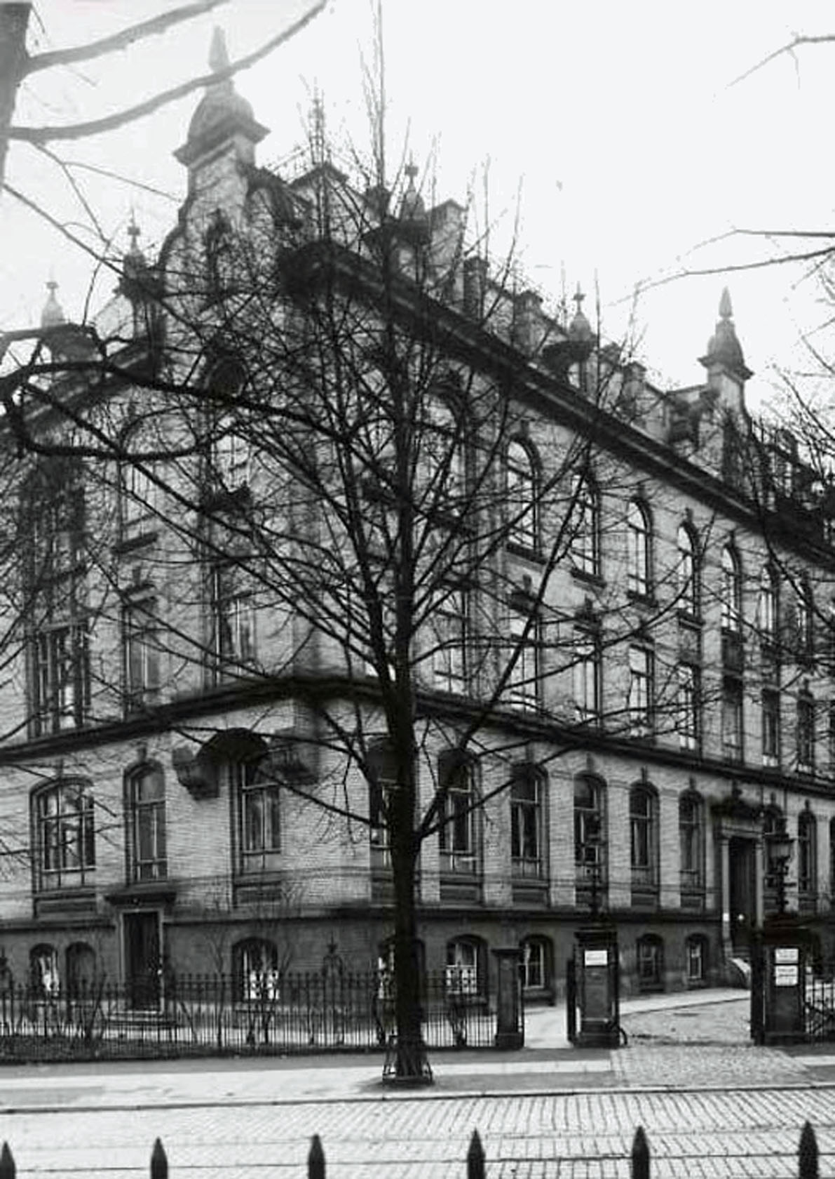 Hygiene Institut Hamburg Jungiusstraße